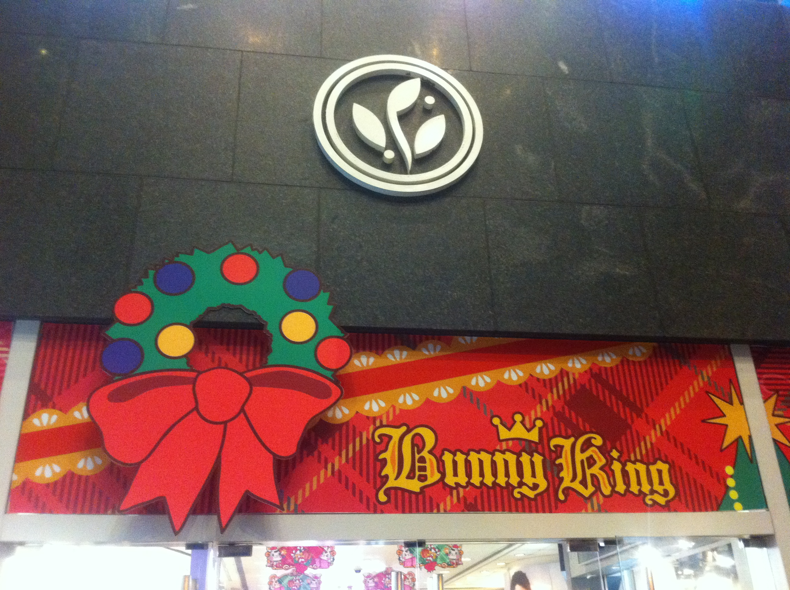 中文（香港）: 西寶城 2011年12月